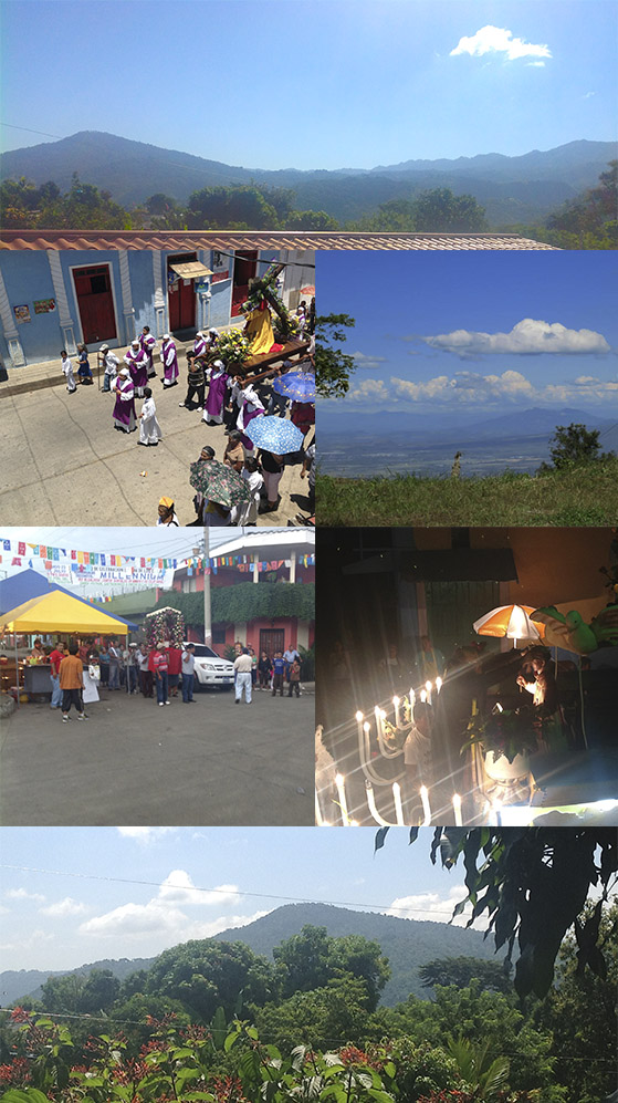 Collage